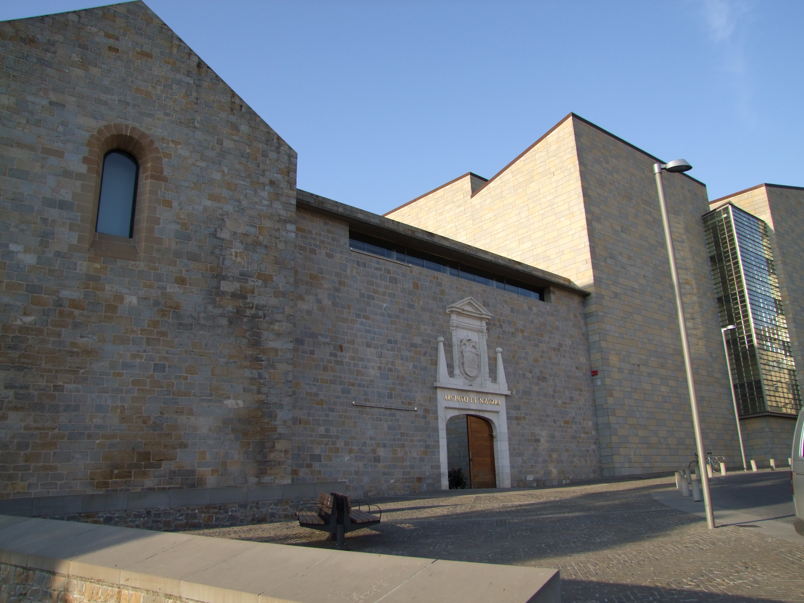 INAP, hots, Nafarroako Administrazio Publikorako Institutuaren XXV. urtemuga izan da martxoaren 9an Iruñeko alde zaharrean. Bertan mintzaldia eman dut etorkizuneko formakuntzaz. Crowdsourcinga formakuntzan sartzeko aukera ere aipatu dut. Eskerrik asko Tomás Rodríguez Garraza jaunak zuzentzen duen INAP erakundeari, Álvaro, Iñaki eta Marimar lagunei ere. Eta eskerrak ere, Javier Caballero presidenteordeari ere. Izan daitezen fotoak gertakari honen gomutagarri betirako. En el 25 aniversario del INAP (Instituto Navarro de la Adminsitración Pública), he tomado parte en el evento con una conferencia sobre el futuro de la formación. He comentado la posibilidad de integrar el crowdsourcing en la formación. Doy las gracias a D. Tomás Rodríguez Garraza, director del INAP; a Álvaro Martínez, a Iñaki, a Marimar y a los demás amigos que he dejado en la vieja Iruña. También mi agradecimiento al vicepresidente D. Javier Caballero. Sirva estas fotos y el vídeo como recuerdo para siempre de este evento.